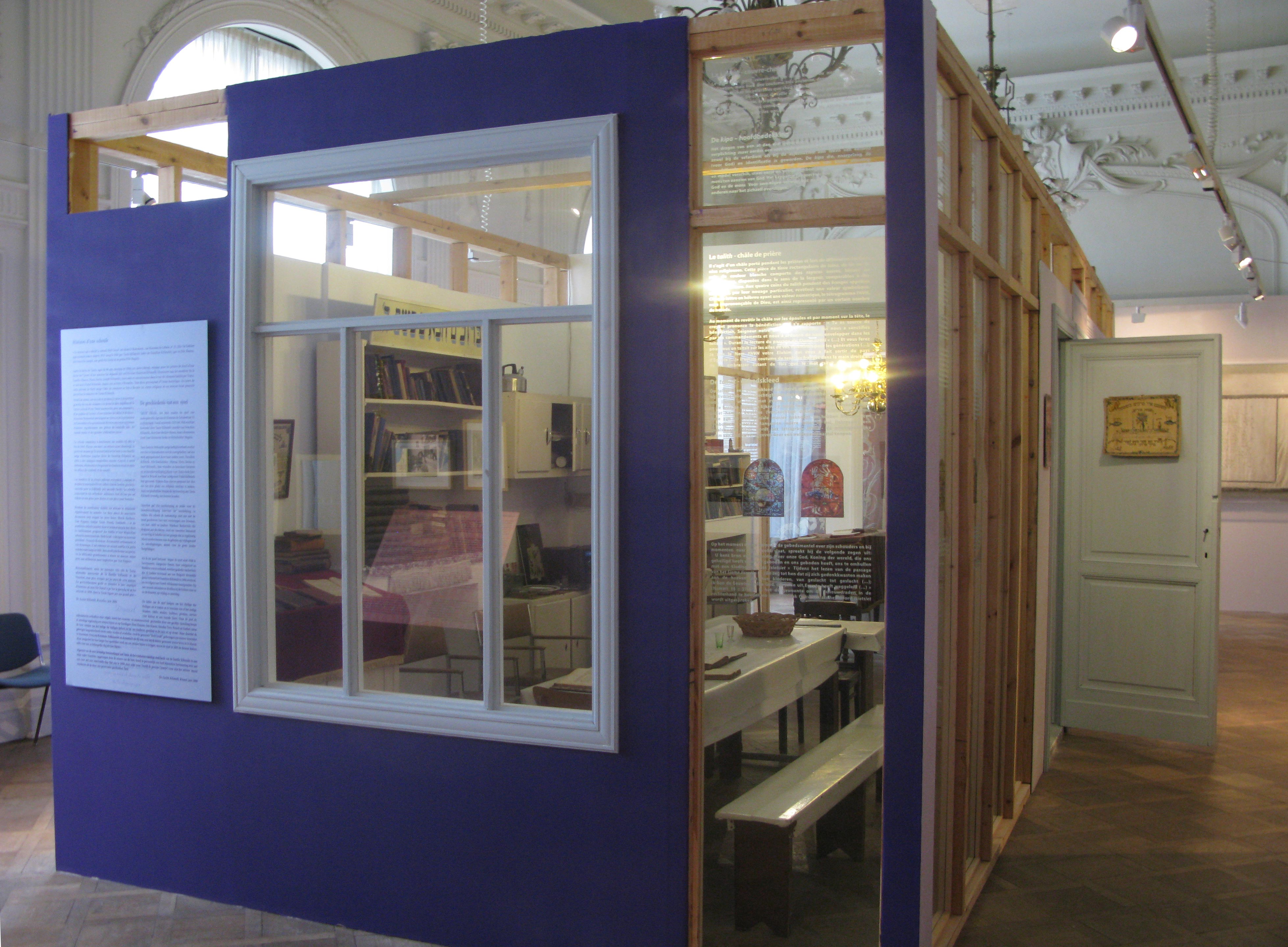 Das Bild zeigt, wie die Schoule Beth Israël in den Räumlichkeiten des Museums installiert ist.